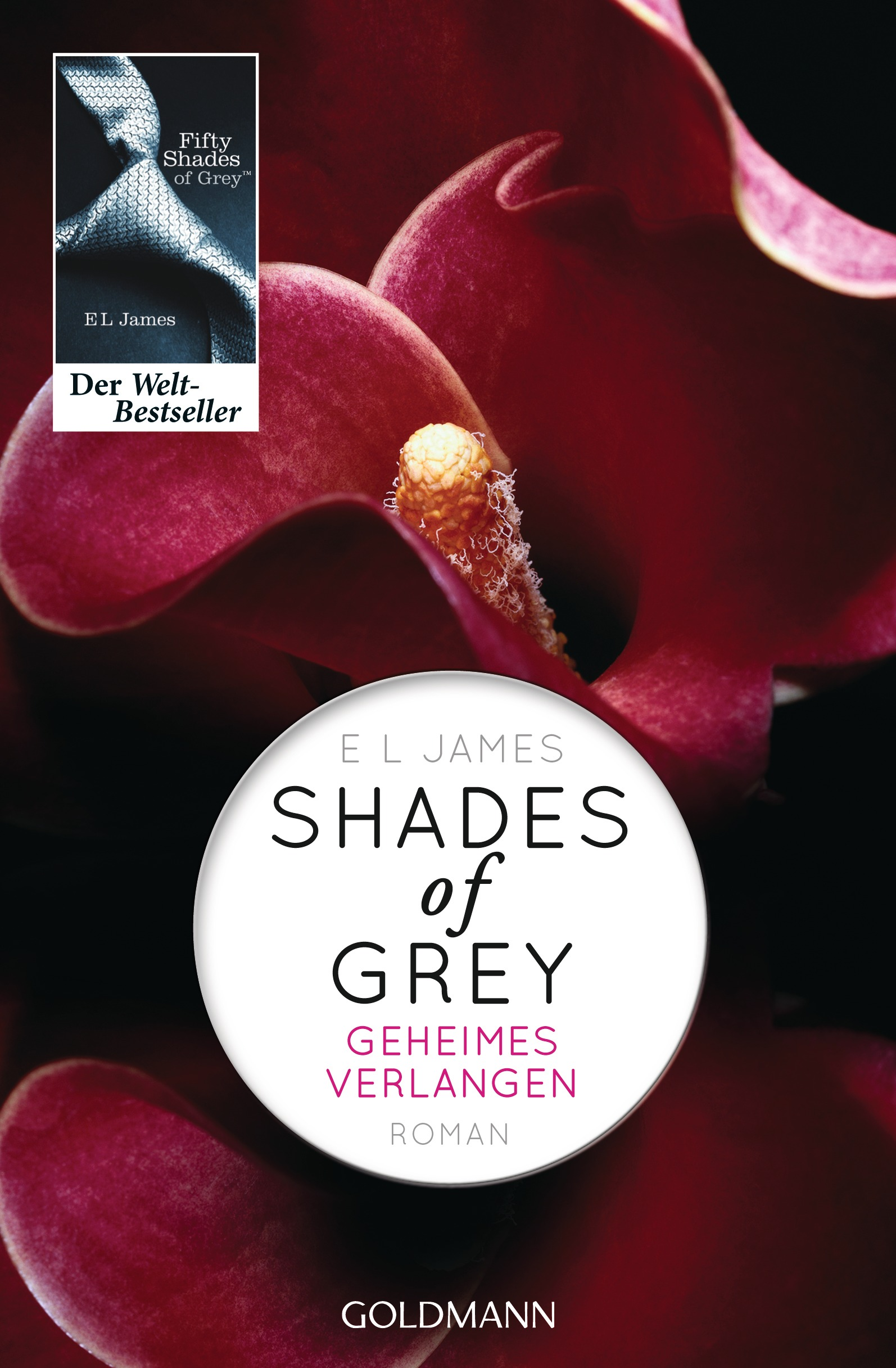 E. L. James: Shades of Grey - Geheimes Verlangen. Goldmann, München 2012 (mit Cover in Cover des Hardcovers). DNB